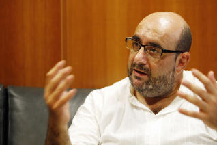 Miguel Borra, actual presidente de CSI-F desde Noviembre de 2010